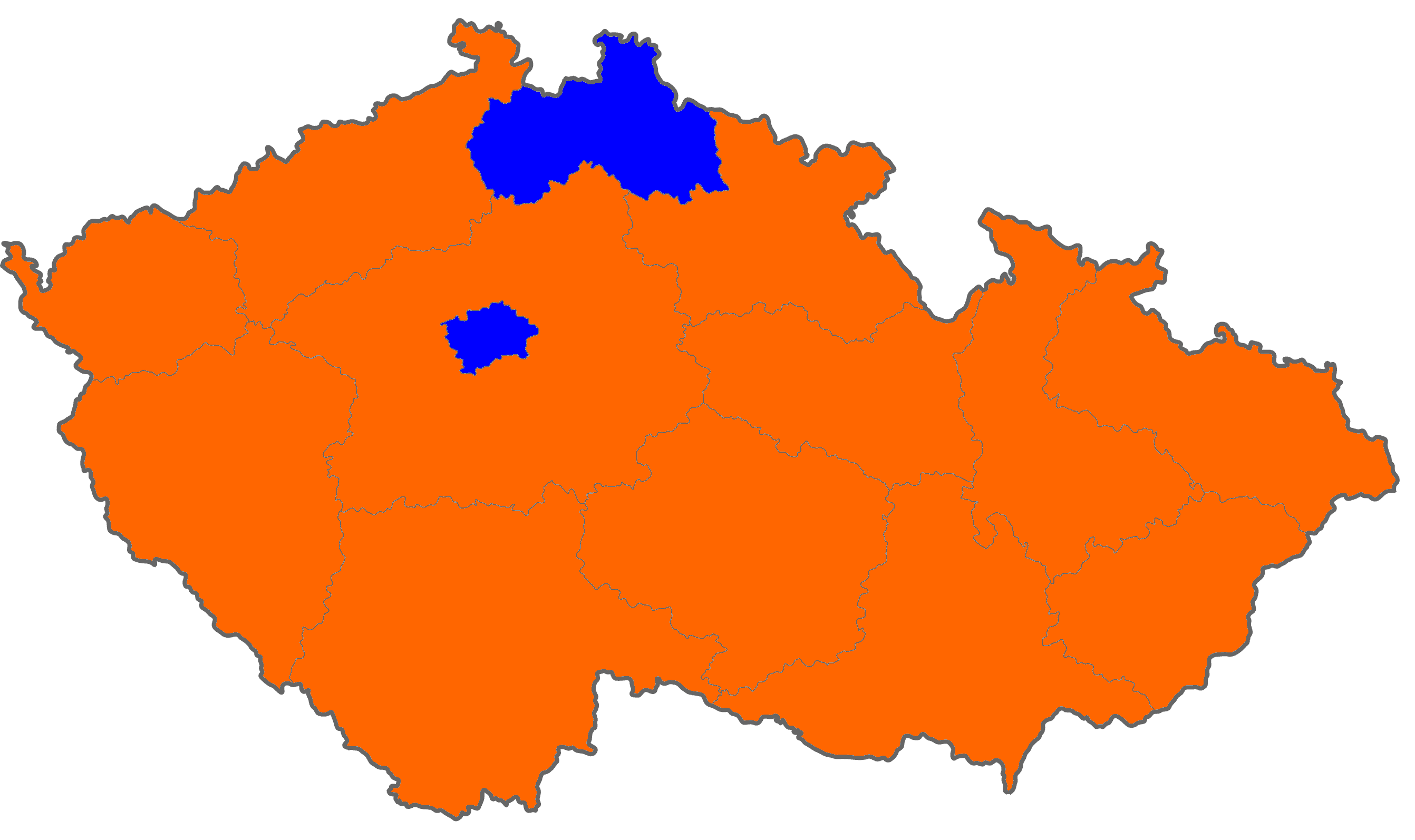 Vítězné strany voleb do Poslanecké sněmovny Parlamentu České republiky v roce 2002 podle krajů